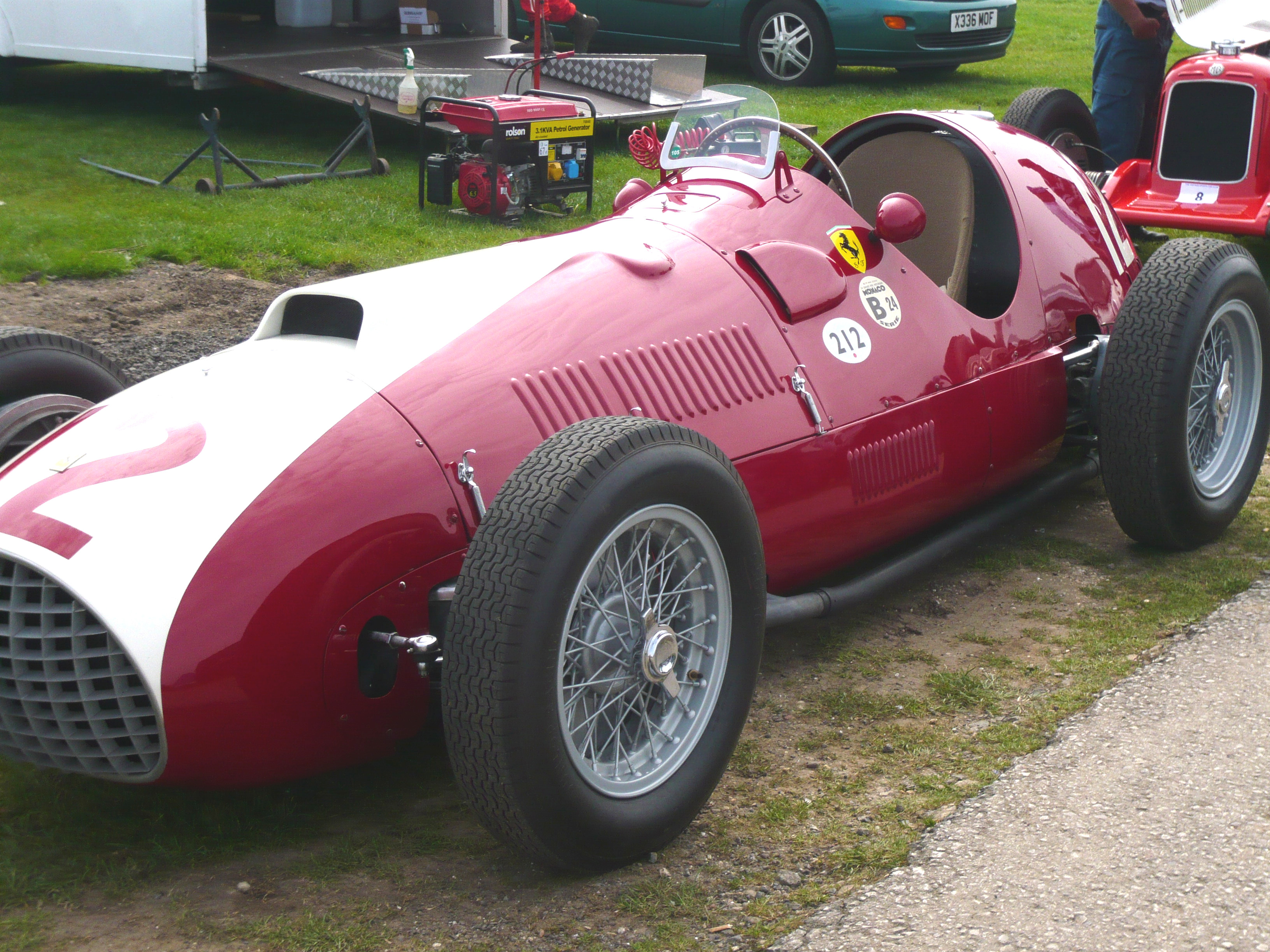 1952 Ferrari 166/212 'America' 2500cc